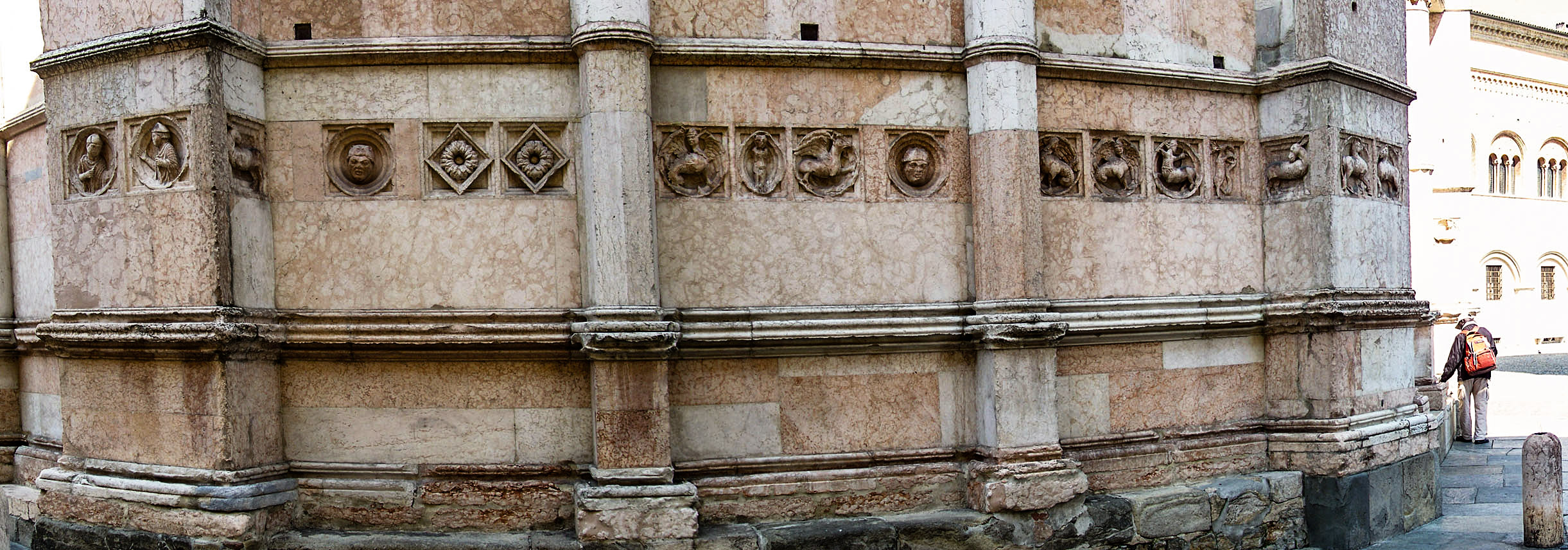 Zooforo del battistero di Parma